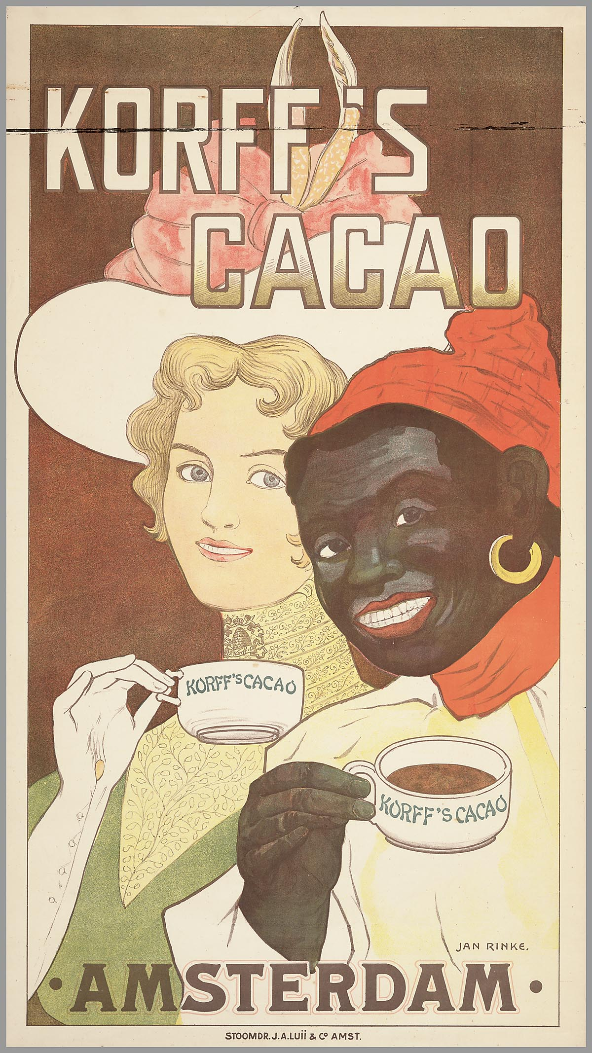 Affiche:Korff's cacao, Amsterdam. Opdrachtgever/adverteerder: F. Korff & Co (Amsterdam)